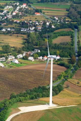 Szápár, Hungary, aerialphotography